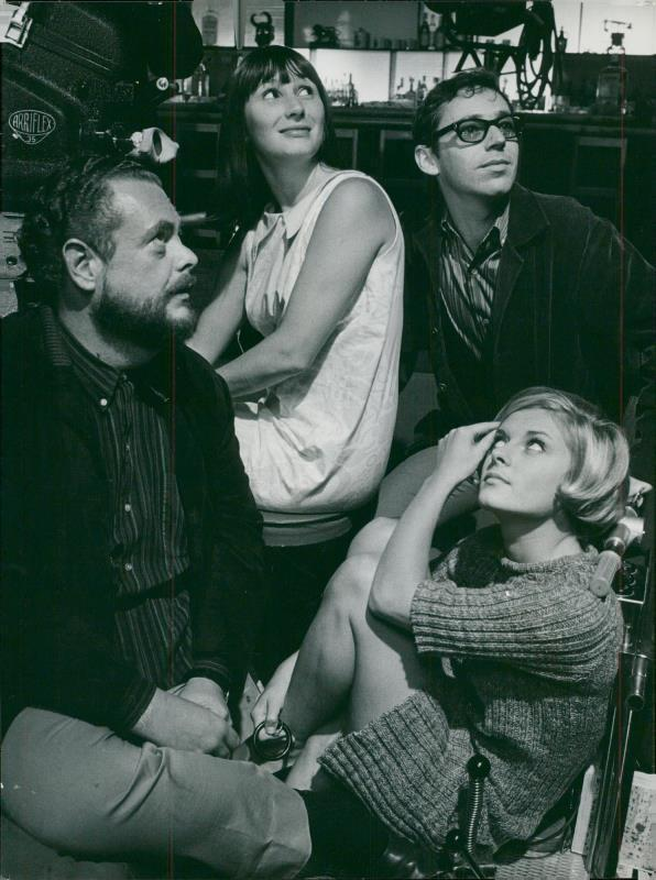 Under inspelningarna av filmen Prinsessan. I förgrunden: regissören Åke Falck och titelrollsinnehavaren Grynet Molvig. Bakom dem Monica Nielsen och Heinz Spira.